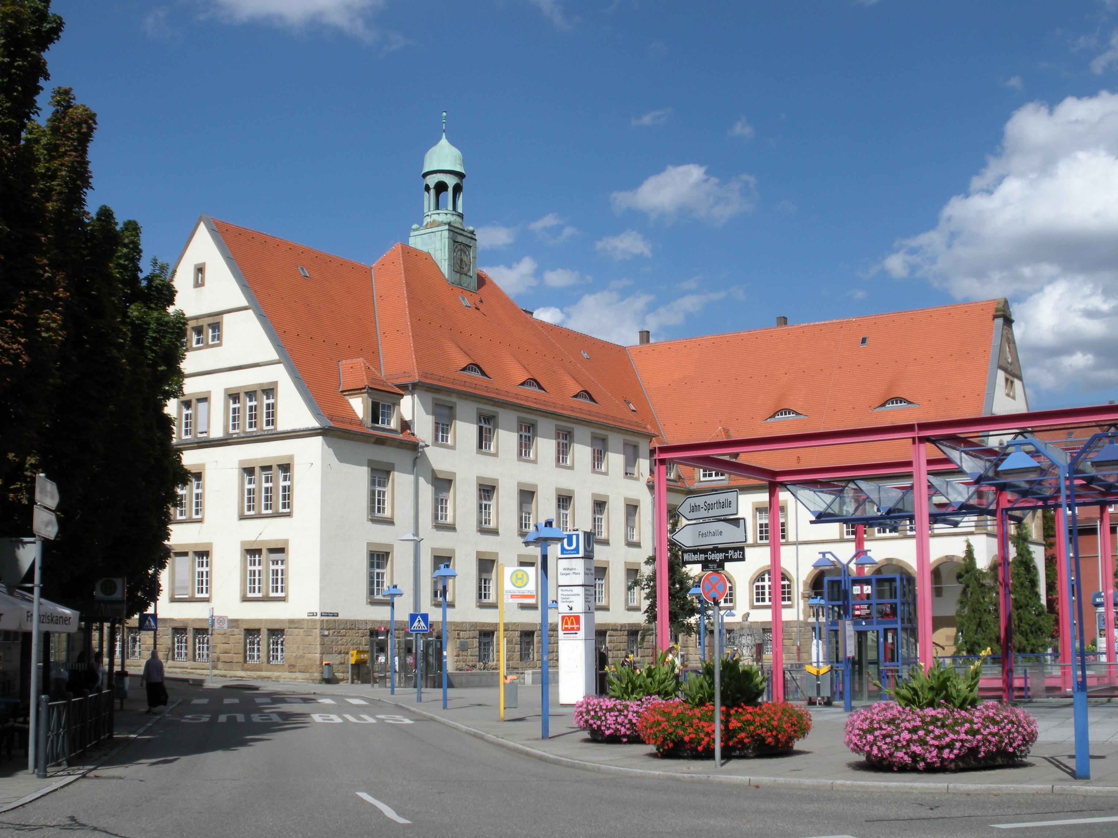 Bezirksrathaus Feuerbach in Stuttgart, erbaut 1907–1909 von den Stuttgarter Architekten Ludwig Eisenlohr und Carl Weigle